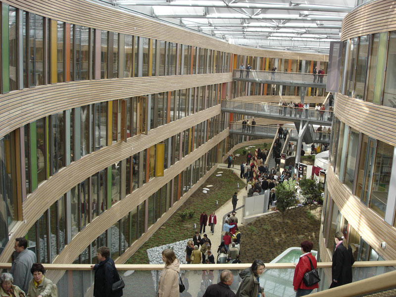 Das Umweltbundesamt in Dessau (UBA)zur Eröffnung